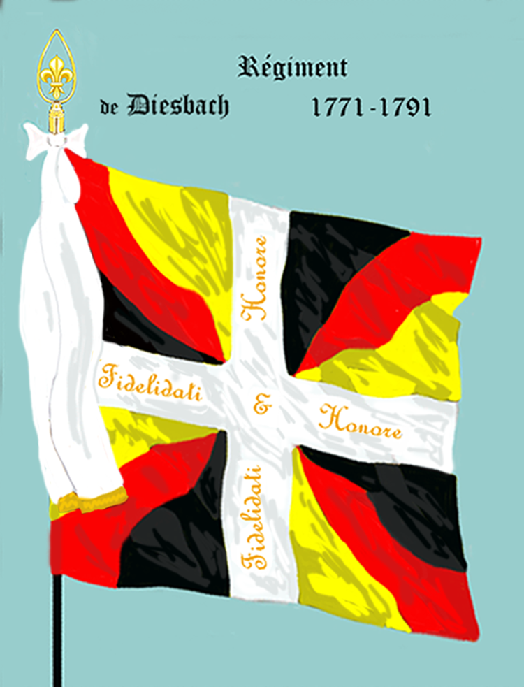 Ordonnanzfahne eines Fremdenregiments im königlich französischen Dienst. (Schweizer Regiment) - Entnommen und überarbeitet aus: „LES UNIFORMES ET LES DRAPEAUX DE L'ARMÉE DU ROI“ Marseille 1899. - Drapeau d'Ordonnance d' un régiment étranger au service française (régiment suisse.)